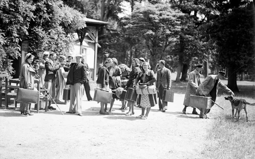 En gruppe unge holder ved Pavillonen en sommerdag i 1939